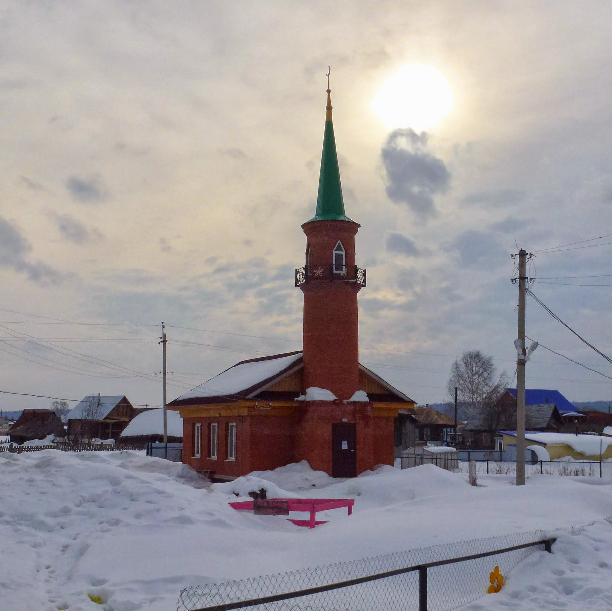 Мечеть. Аклуши